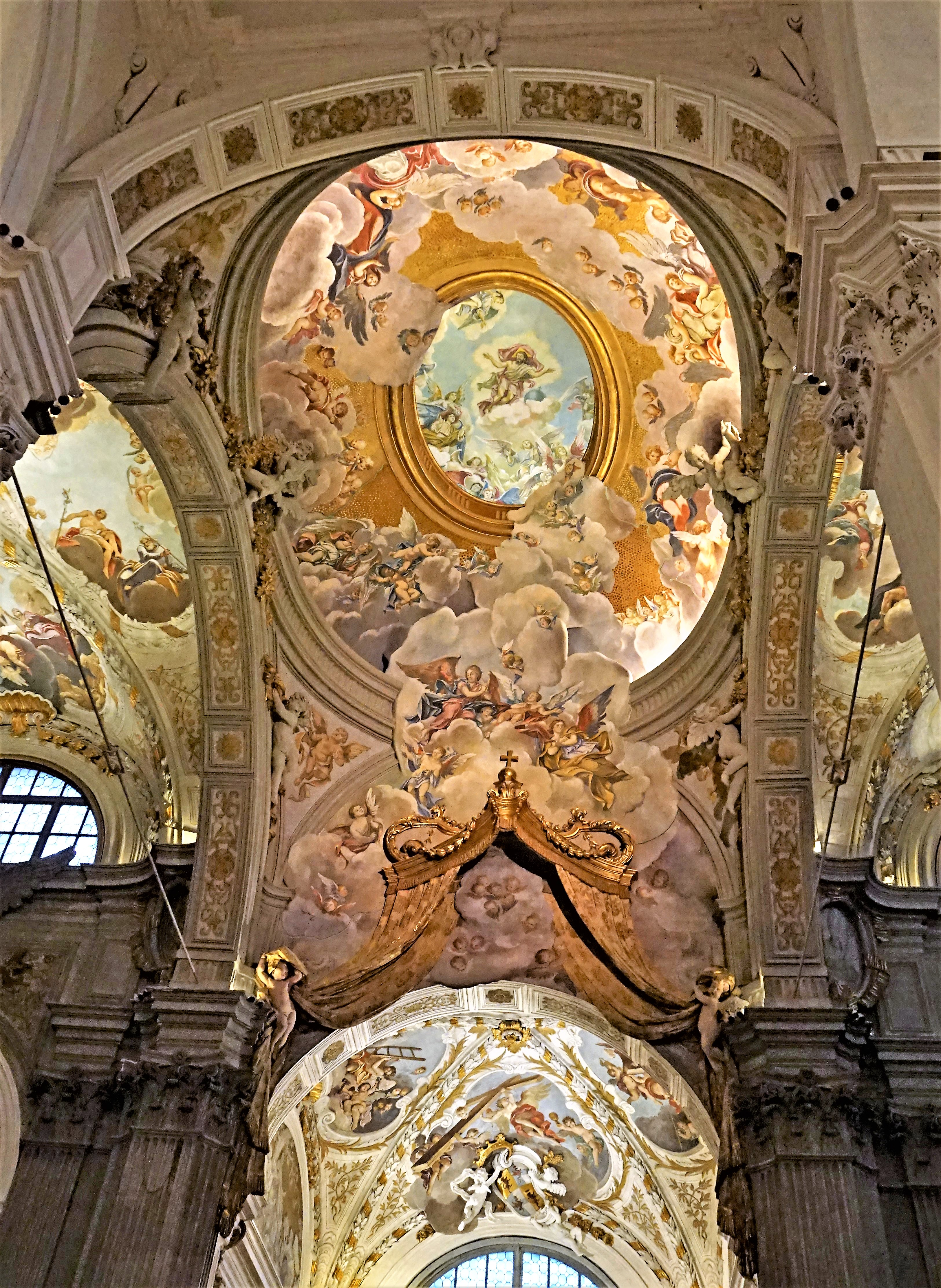 Dom von Udine, Blick in die Kuppel